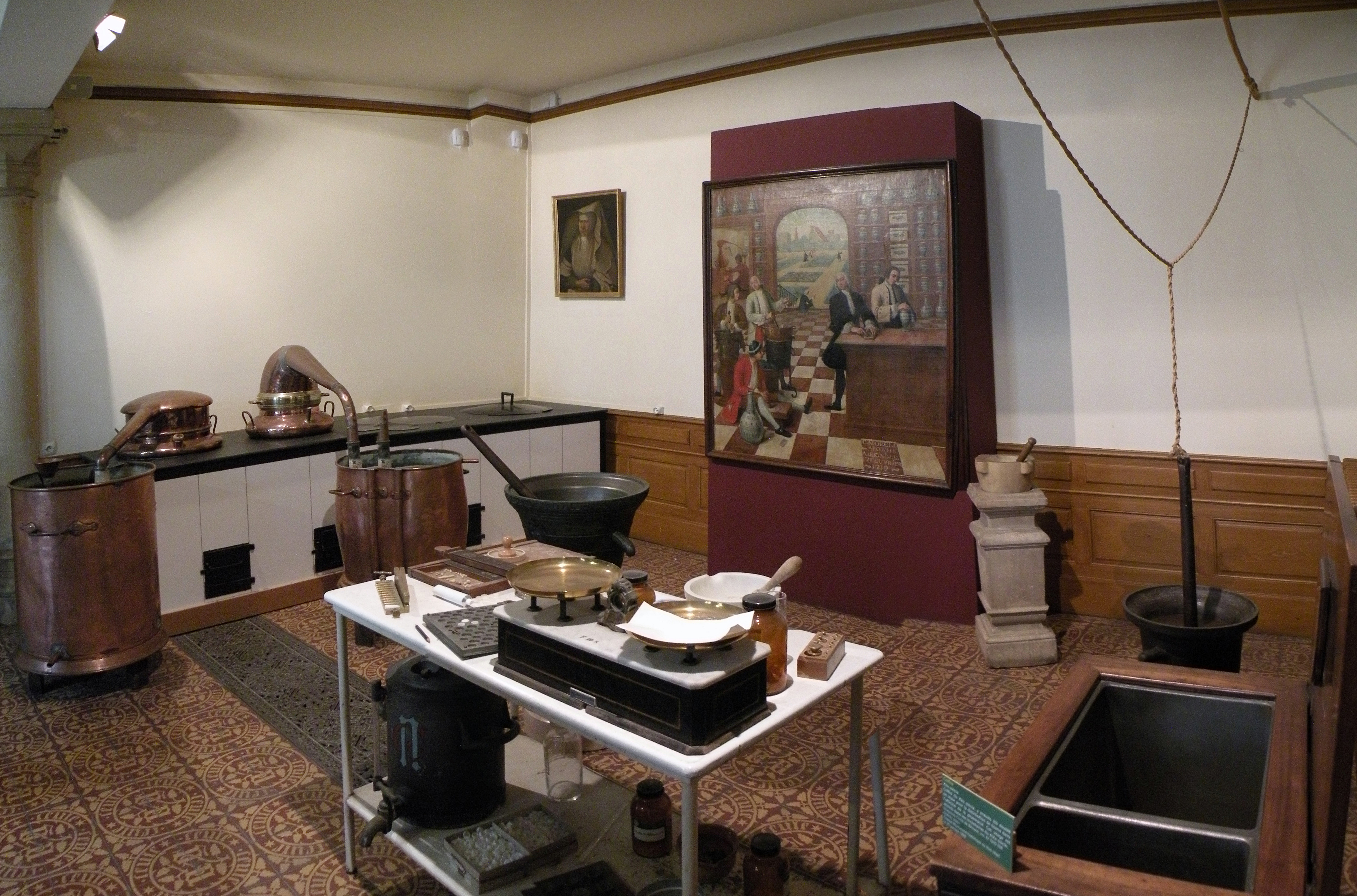 Провизорская аптеки госпиталя города Бона